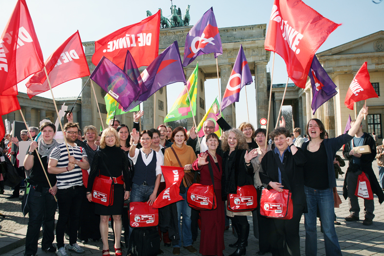 Equal Pay Day am 23. März 2012